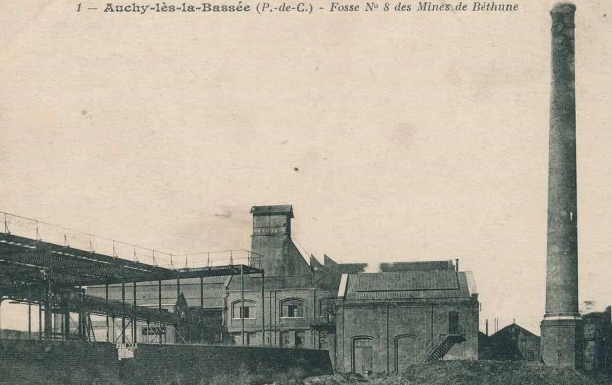 La Fosse n° 8 - 8 bis de la Compagnie des mines de Béthune était un charbonnage constitué de deux puits situé à Auchy-les-Mines, Pas-de-Calais, Nord-Pas-de-Calais, France.